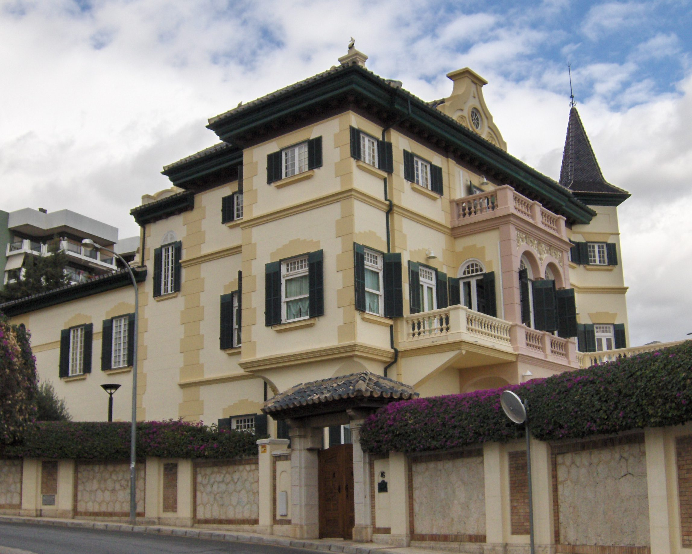 Villa Valdecilla. Vivienda en calle Juan Valera, Pedregalejo, Málaga, España.